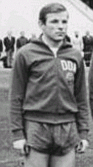 Title: DDR-Fußball-Nationalmannschaft People in the image: Bransch, Bernd: Fußballspieler, DDR * Blochwitz, Wolfgang: Fußballtorwart, DDR * Erler, Dieter: Fußballspieler, DDR * Frenzel, Henning: Fußballspieler, DDR * Hoge, Günter: Fußballspieler, DDR * Irmscher, Harald: Fußballspieler, DDR * Löwe, Wolfram: Fußballnationalspieler, DDR * Nöldner, Jürgen: Fußballspieler, DDR * Pankau, Herbert: Fußballnationalspieler, Olympiateilnehmer 1964, DDR * Urbanczyk, Klaus: Fußballnationalspieler, SC Chemie Halle, Olympiateilnehmer 1964, DDR * Wruck, Wolfgang: Fußballspieler, 1. FC Union Berlin, DDR Factual corrections and alternative descriptions are encouraged separately from the original description. Additionally errors can be reported at this page to inform the Bundesarchiv. Original historic description: Zentralbild-Wendorf sche-fe 31.10.67 Fußball-Nationalmannschaft der DDR. (v.l.n.r.) Günter Hoge, Wolfram Löwe, Jürgen Nöldner, Klaus Urbanczyk, Herbert Pankau, Henning Frenzel, Bernd Bransch, Harald Irmscher, Wolfgang Wruck, Torwart Wolfgang Blochwitz und Mannschaftskapitän Dieter Erler.